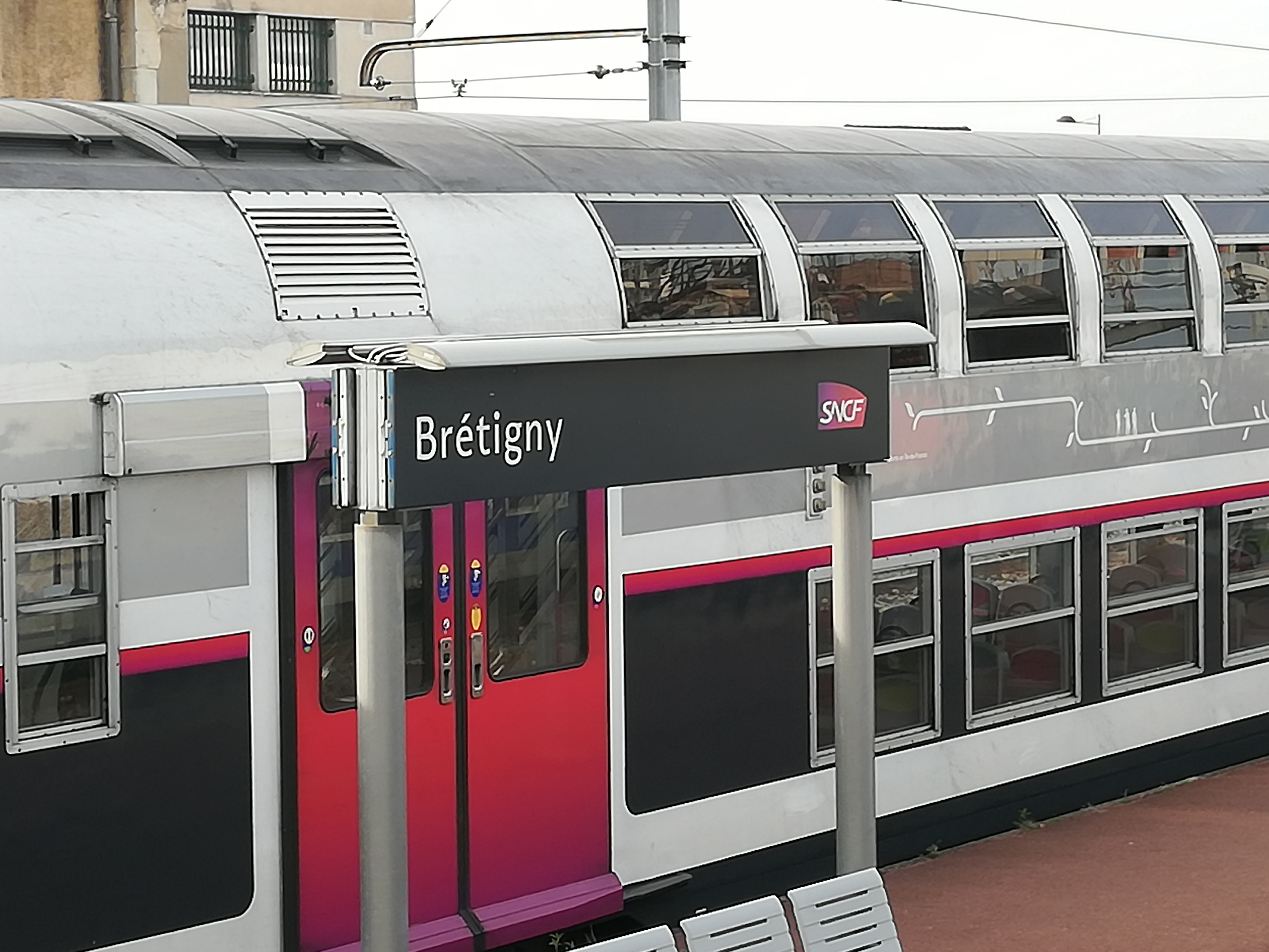 Plaque signalétique de la gare de Brétigny de la ligne C du RER, en 2019.